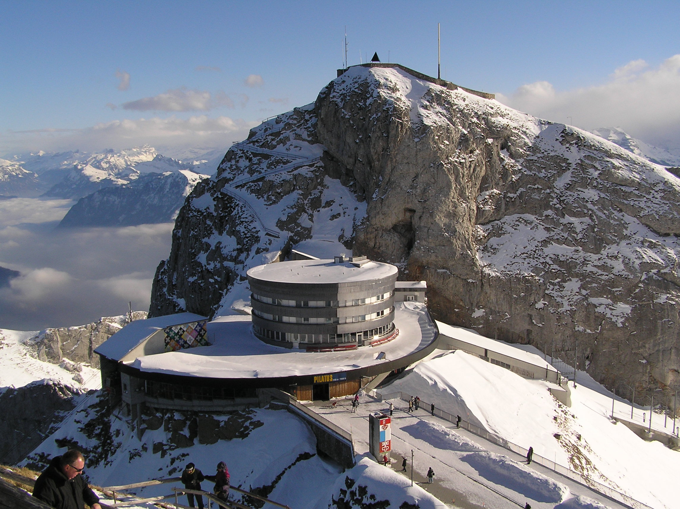 Der Berggipfel und die Endstation von Zahnradbahn und Seilbahn auf dem Pilatus bei Luzern